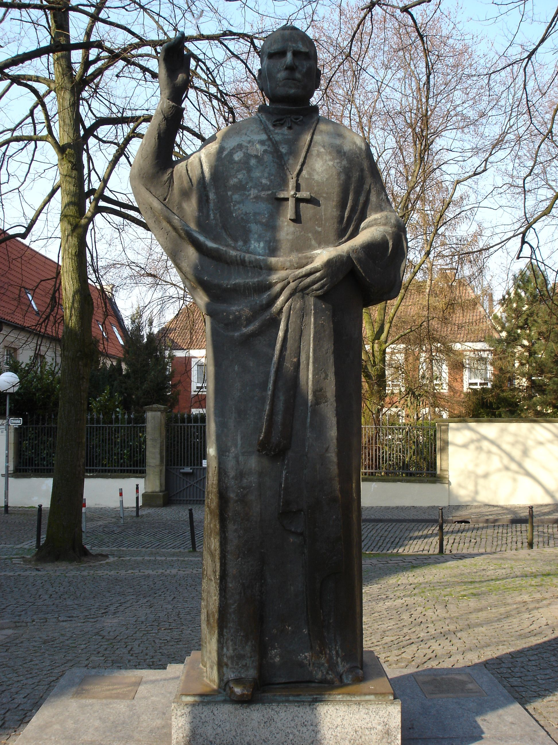 Statue von Clemens August Graf von Galen am nordöstlichen Ende des Domplatzes in Münster